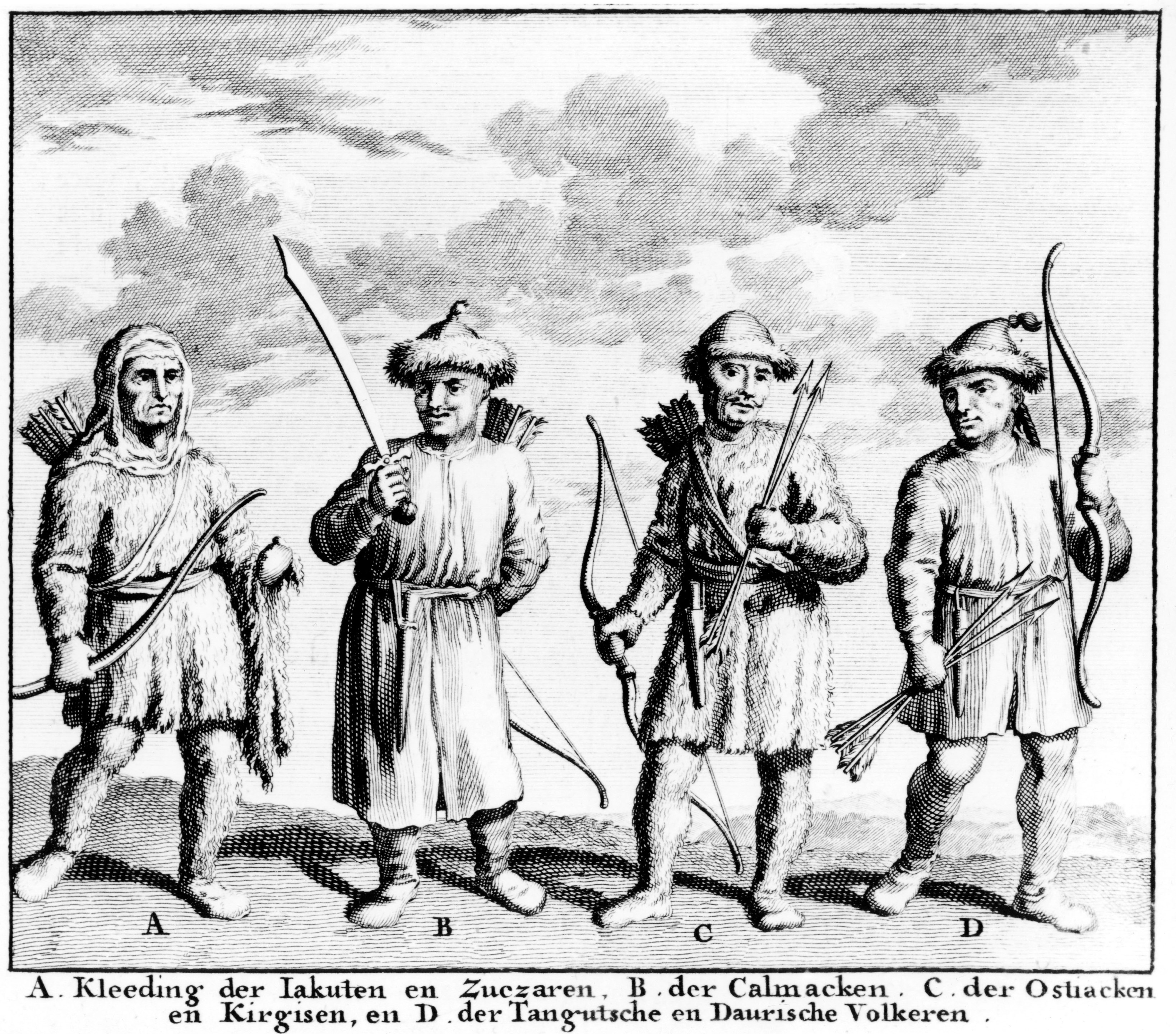 Обитатели Та(р)тарии: А - якут, В - калмык, С - киргизский остяк, Д - даурский тунгус.